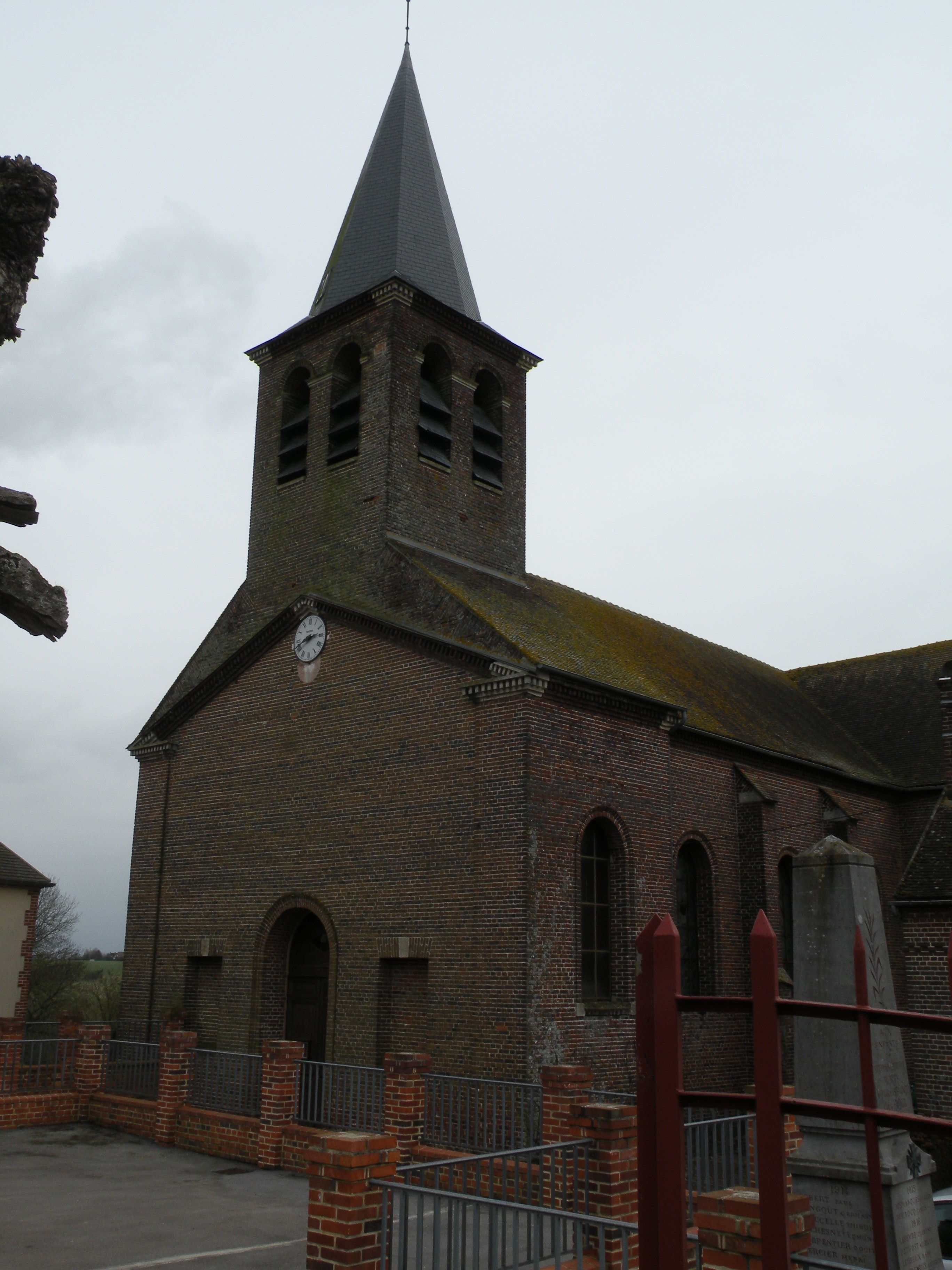 église de Saint-Germain-la-Poterie